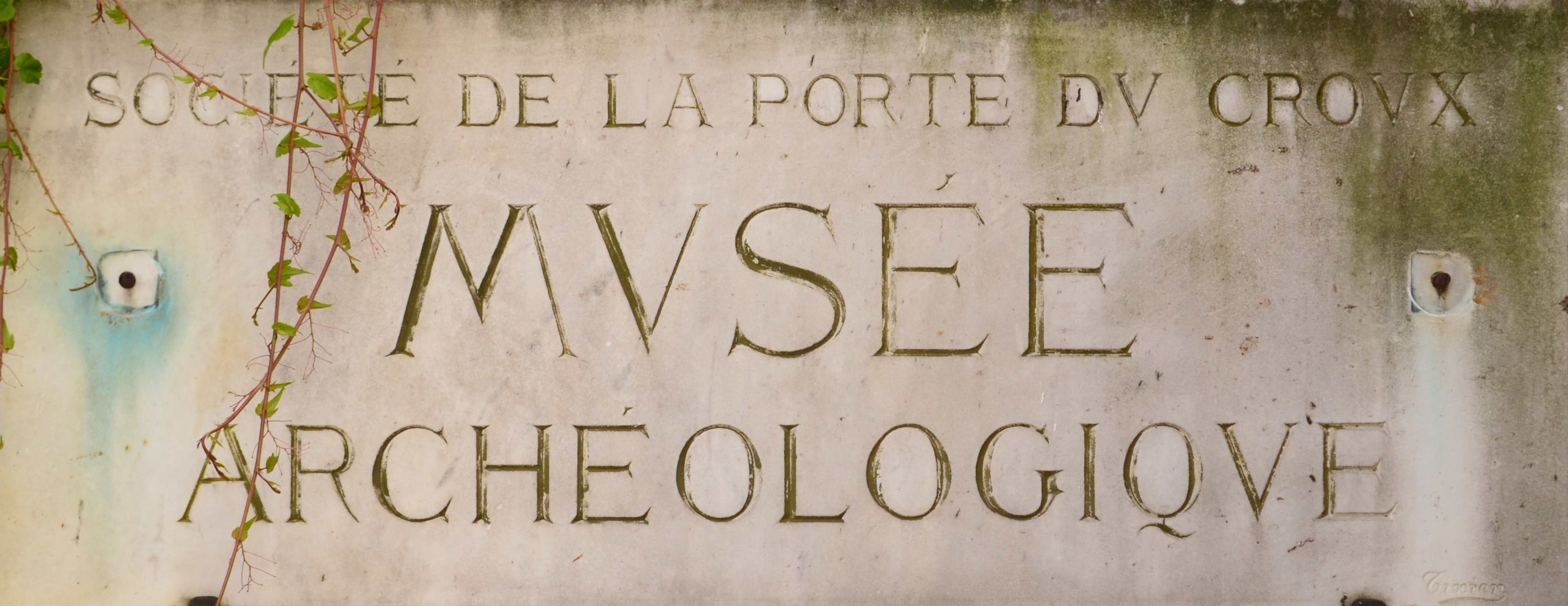 Musée de la porte du Croux (Nevers), siège de la Société nivernaise des lettres, sciences et arts